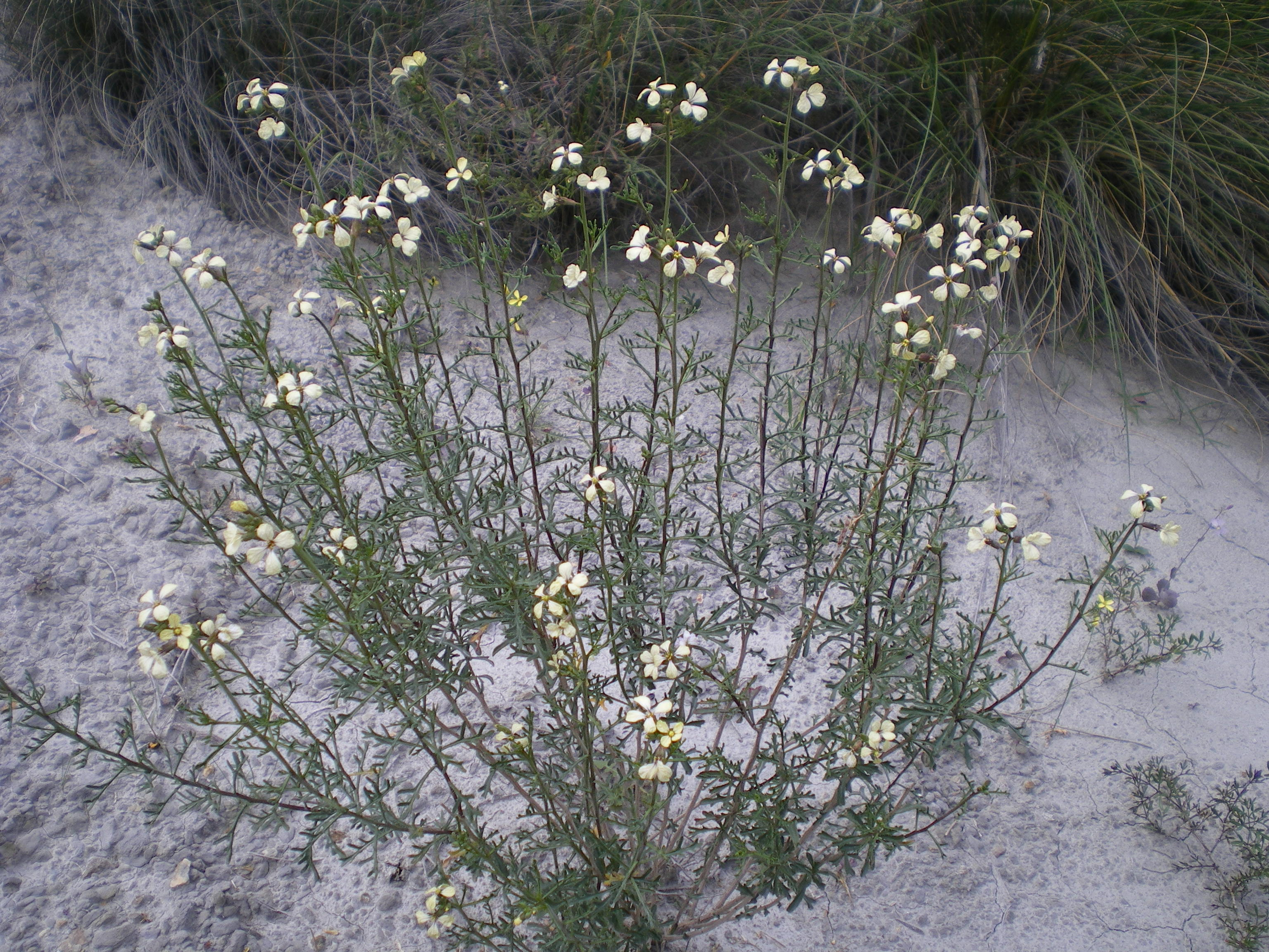 Aspecto general de una mata de Euzomodendron bourgeanum, endemismo almeriense del subdesierto de Tabernas, España.